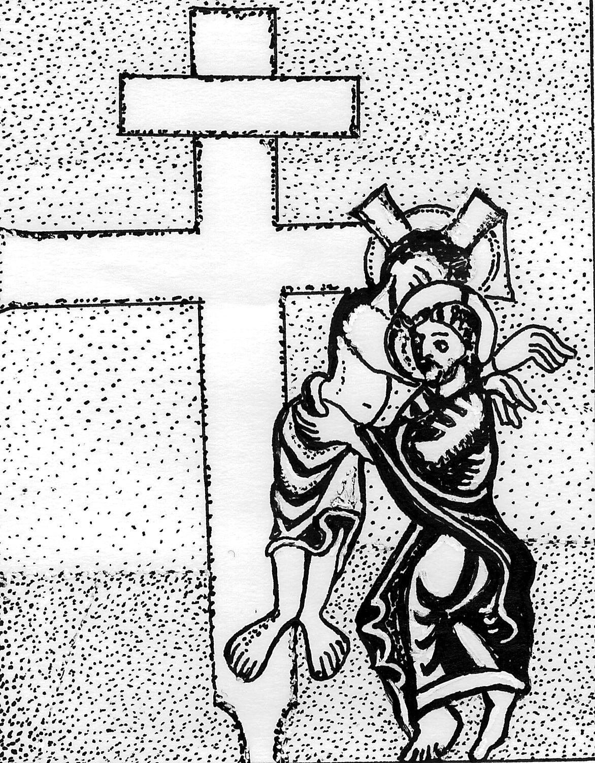 Nachzeichnung der Darstellung der Kreuzabnahme im Fuldaer Sakramentar. SUB Göttingen. Cod.theol.231.